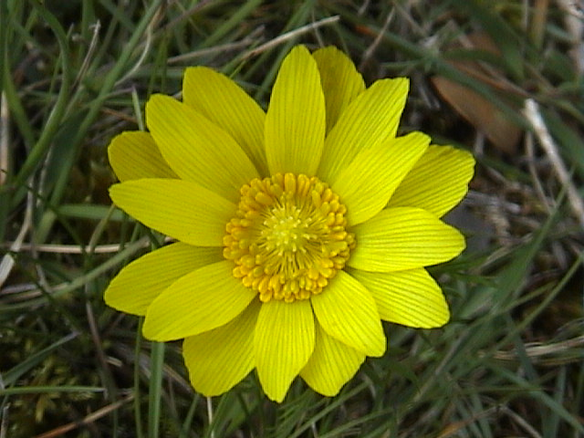 Flor dialipétala.Fam. Ranunculáceas. Especie: Adonis vernalis La Rioja. España